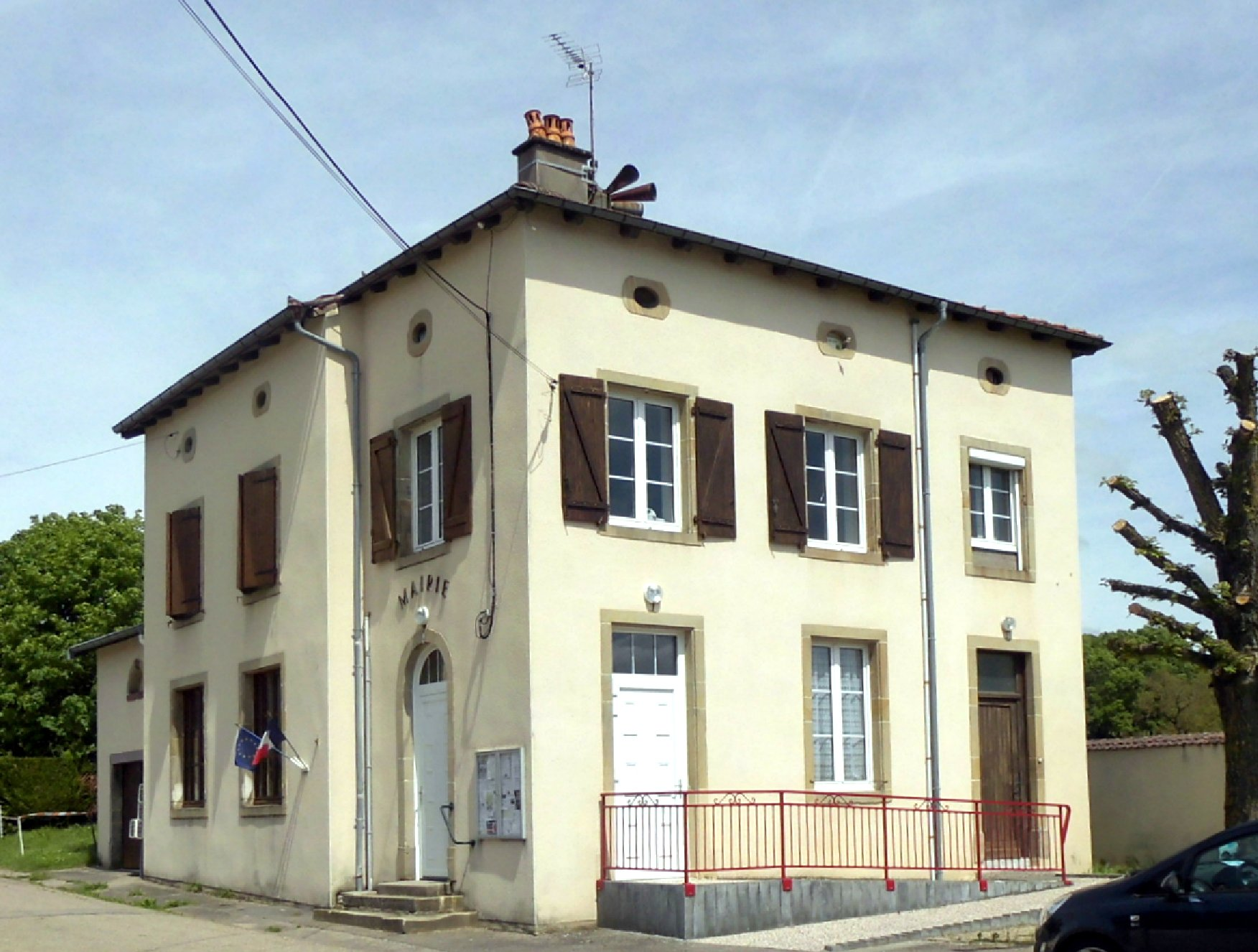 La mairie de Domvallier